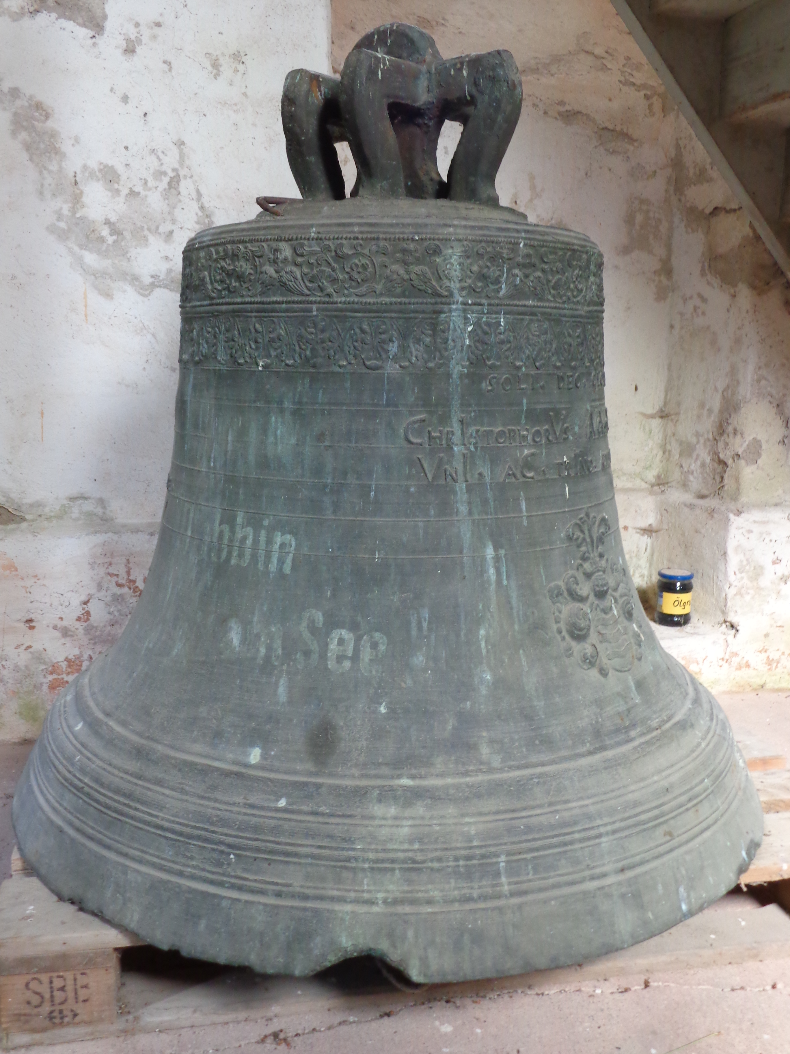 Kirchenglocke der Dorfkirche Dobbin